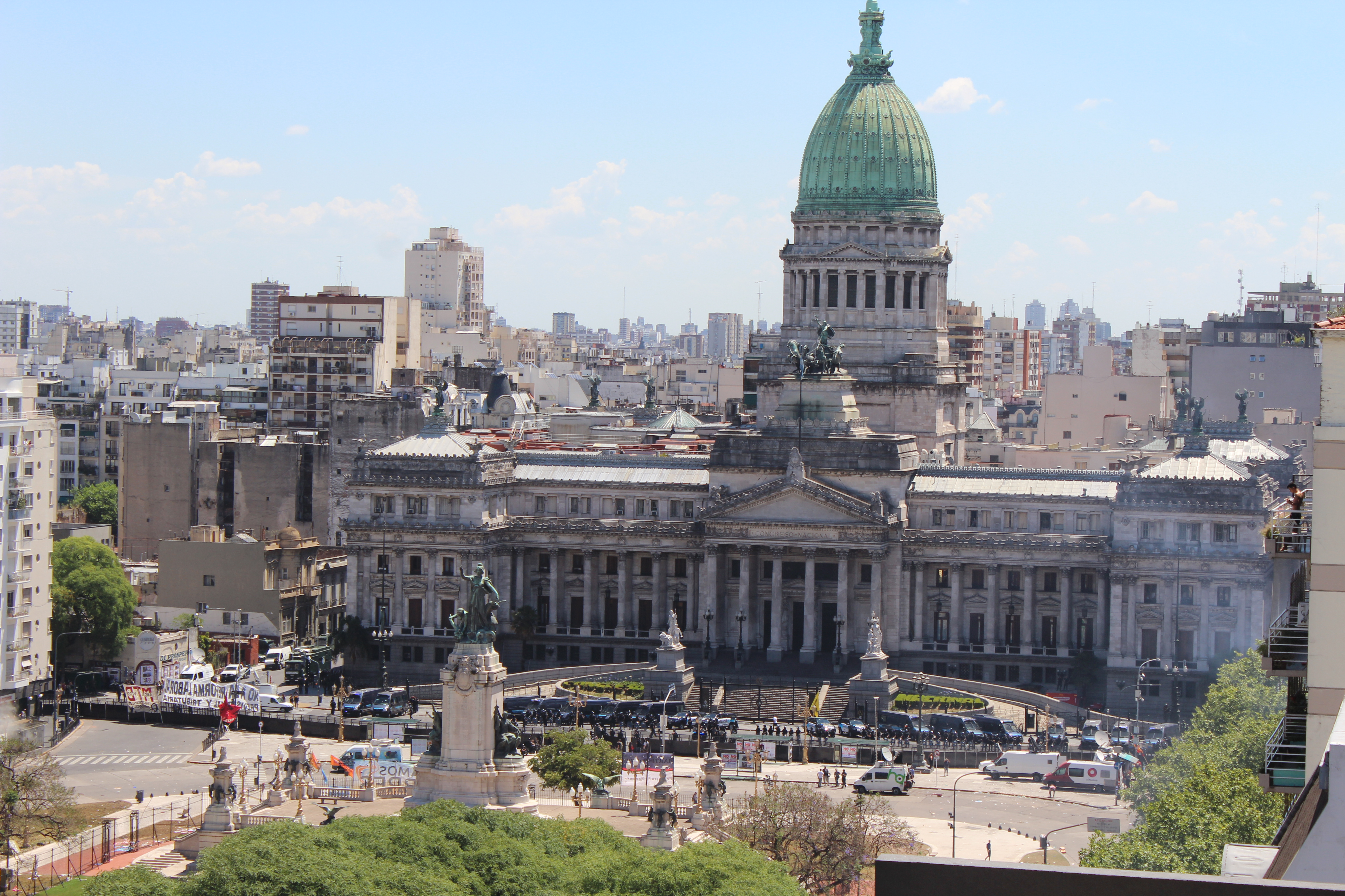 Represión en la marcha contra la ley de previsión en el Congreso de la Nación (Argentina).